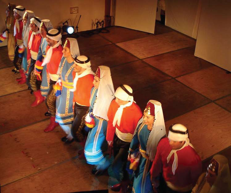 فرقة رقص سورية